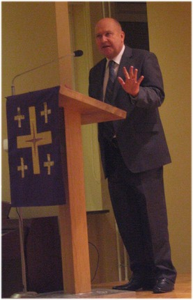 biskup Marek Izdebski przemawia w Sali Synodalnej im. bpa Andrzeja Wantuły w Centrum Luterańskim w Warszawie